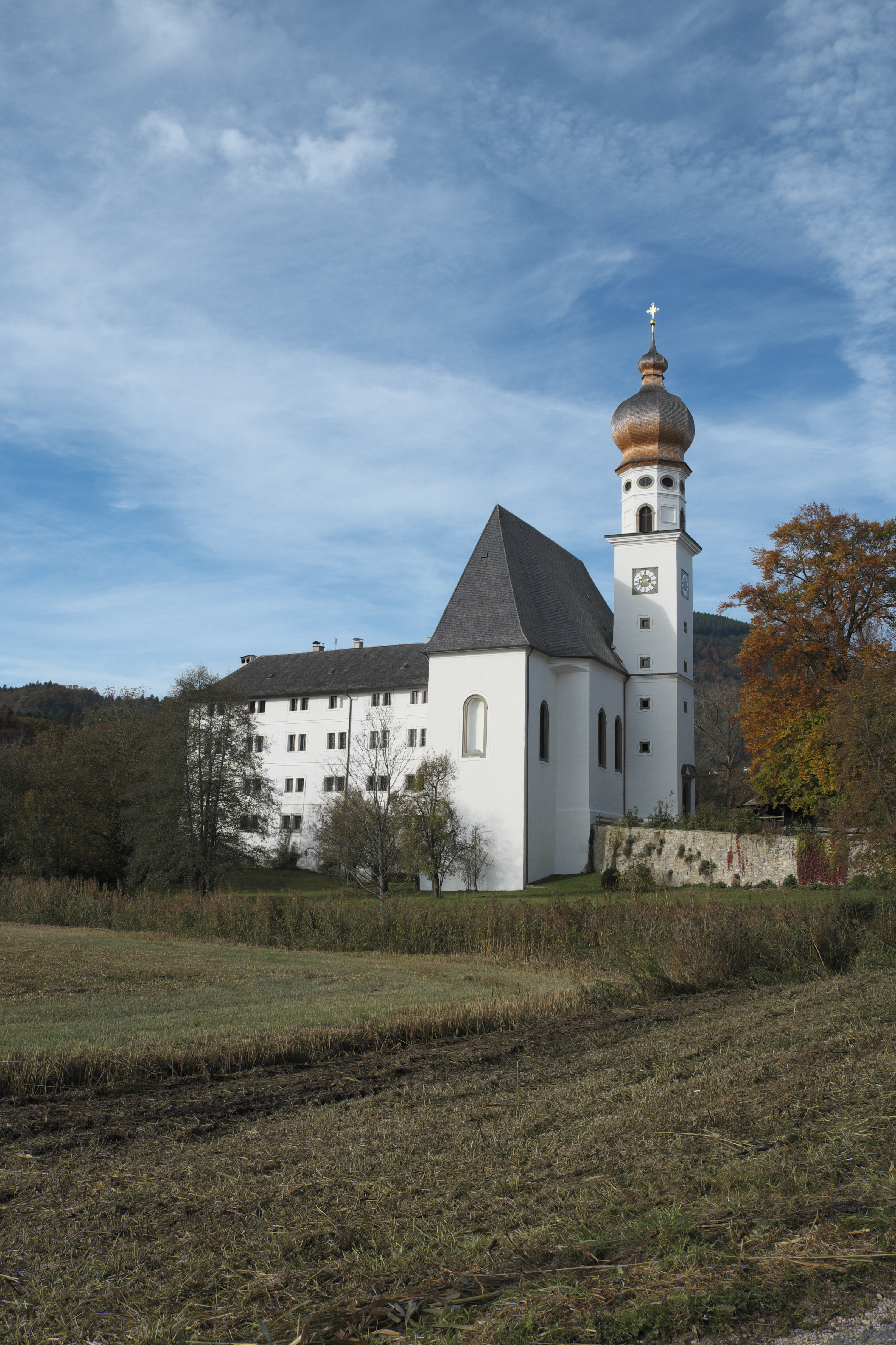 Ehemaliges Augustiner-Chorherren-Stift Kloster Höglwörth in Höglwörth (Anger) im Landkreis Berchtesgadener Land (Bayern/Deutschland)